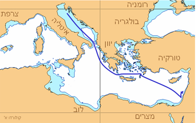 אוניית המעפילים קולורדו - מסלול 1